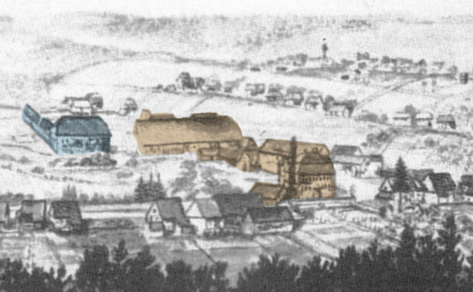 Grünenplan mit Herrenhaus (blau), Hüttenkomplex der Glashütte Grünenplan (braun) und Arbeitersiedlung auf dem Berg, nachträglich koloriert